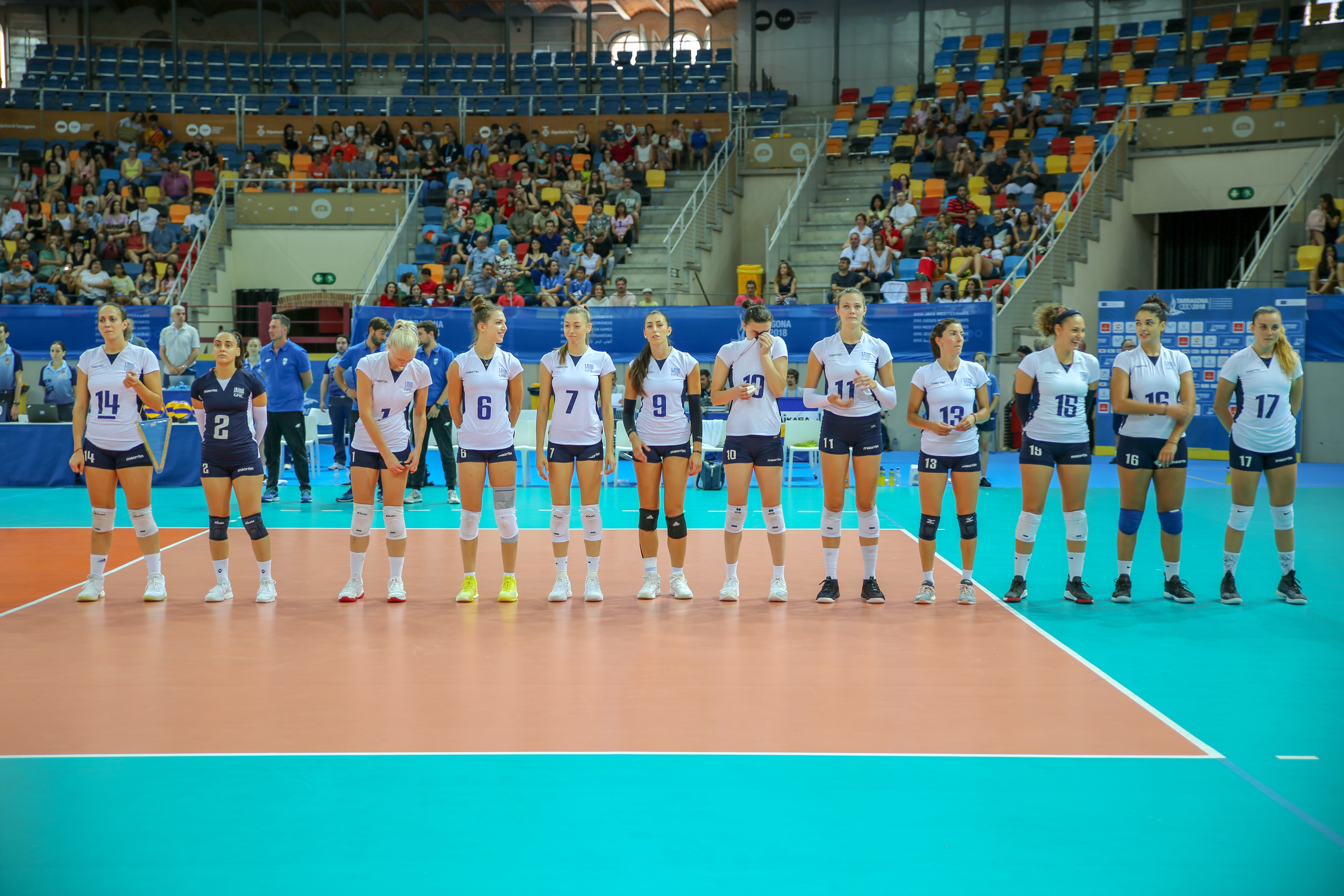 Grecia final - Juegos del Mediterráneo 2018